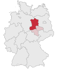 Map of Regierungsbezirk Magdeburg in Saxony-Anhalt